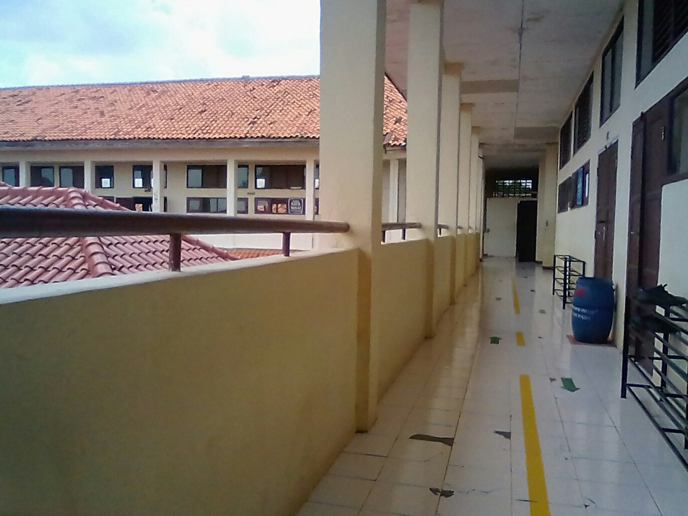 Gedung Kampus Analisis Pengujian Laboratorium SMK Negeri 1 Cikampek